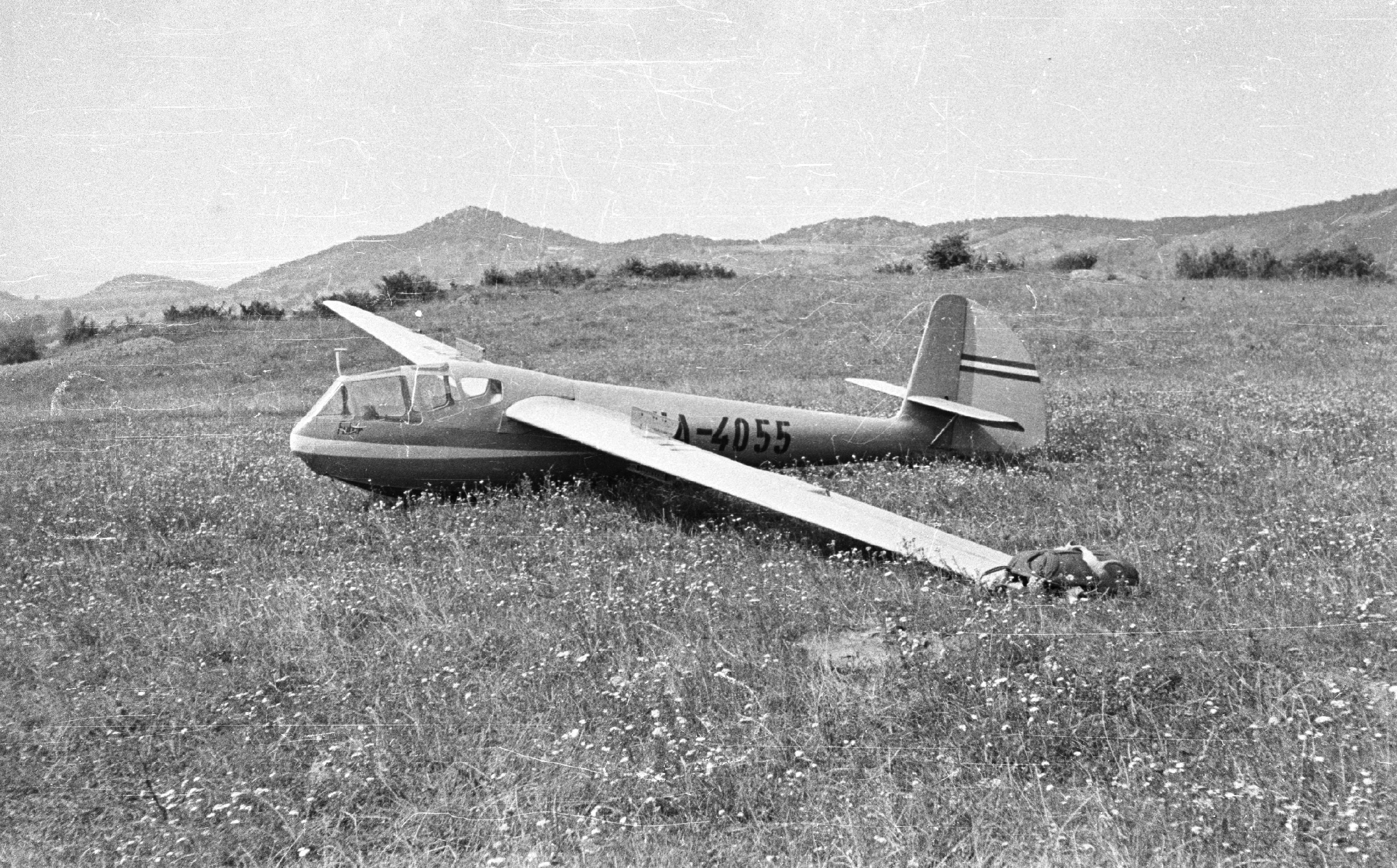 Rubik R-22 Futár vitorlázó repülőgép. Location: Hungary, Budapest II., Hármashatárhegy Airport Tags: sailplane, airport, Hungarian brand, Budapest Title: Rubik R-22 Futár vitorlázó repülőgép.